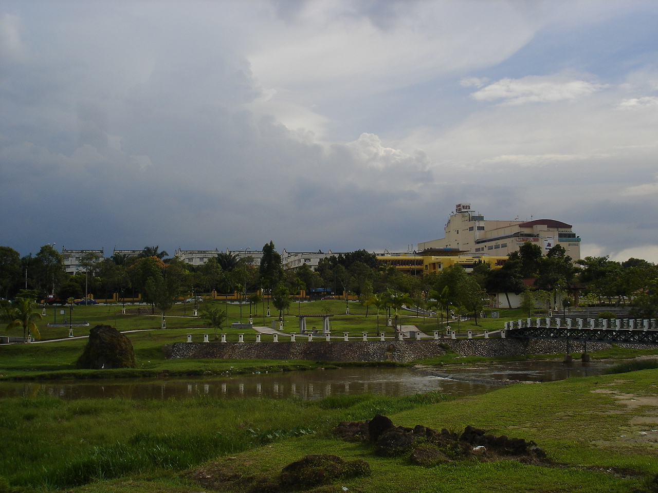 Taman Tasik Cempaka in Bandar Baru Bangi, Selangor, Malaysia, against the backdrop of retail and commercial buildings.